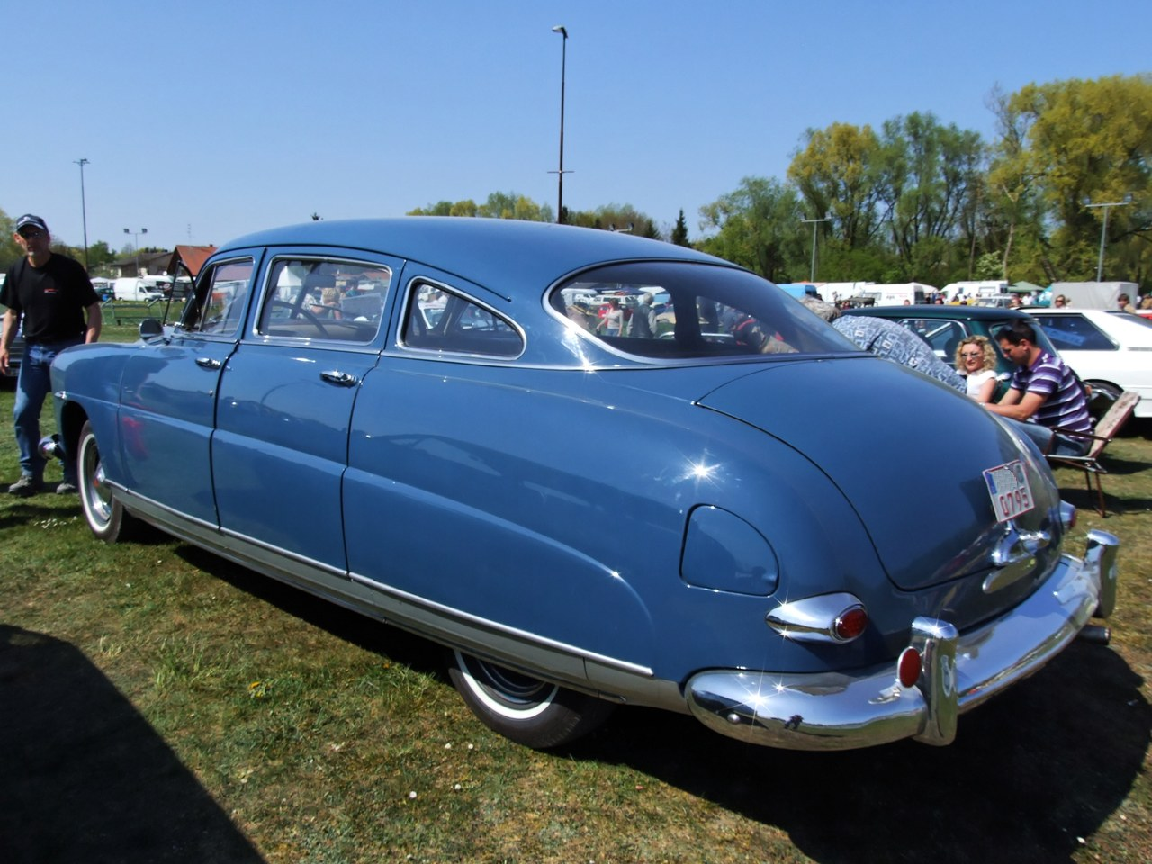 Quelle: selbst fotografiert, 04/2007 Fotograf: Späth Chr.